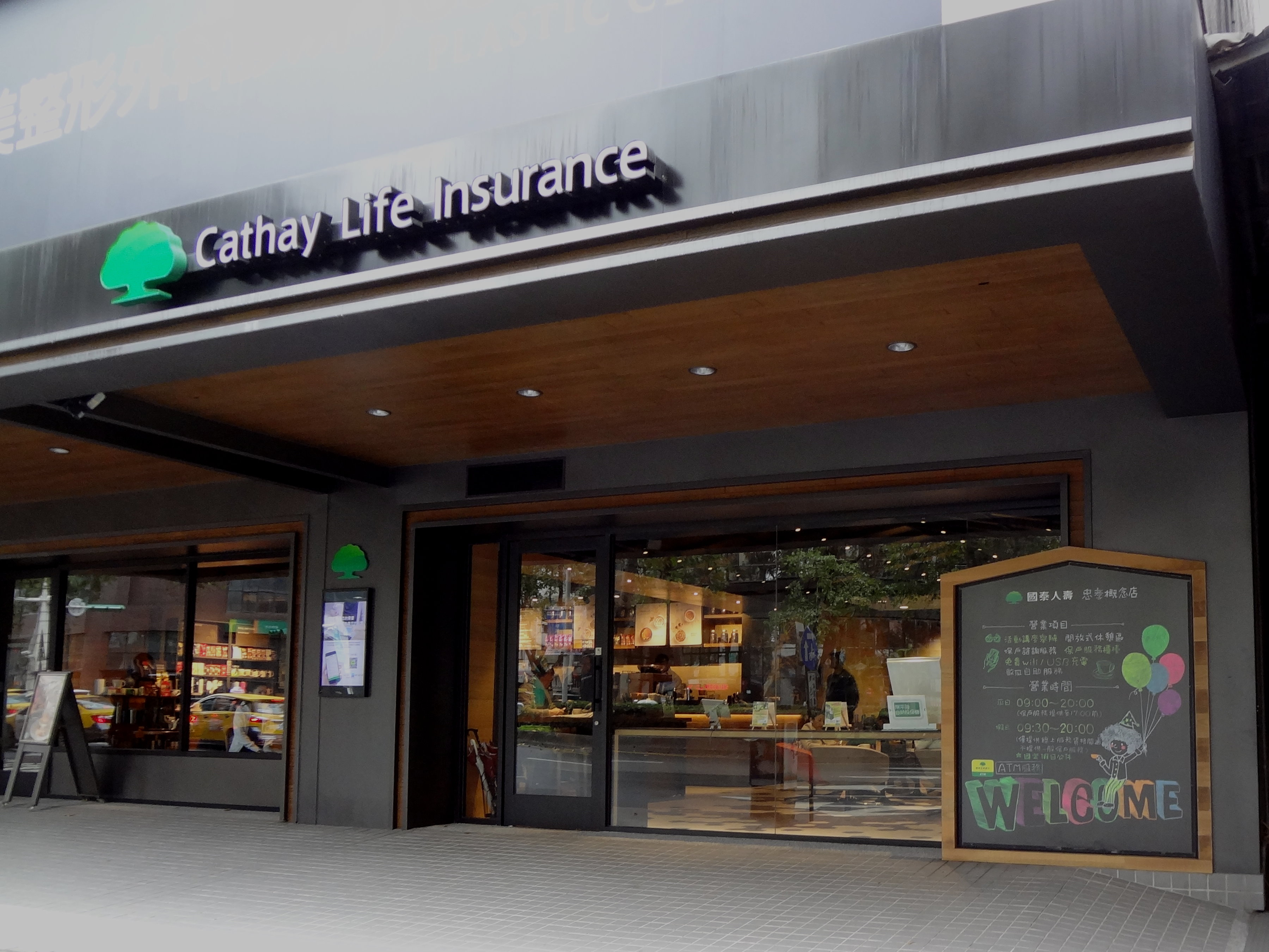 國泰人壽忠孝概念店，地址：臺北市大安區忠孝東路四段230號1樓。